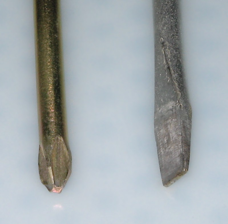 Pintoj de sxrauxbturniloj: maldekstre - kruca, dekstre - ebena. La foto estis farita de mi mem.